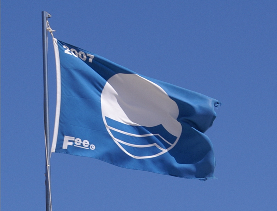 Pavillon Bleu de la Fondation pour l'Éducation à l'Environnement